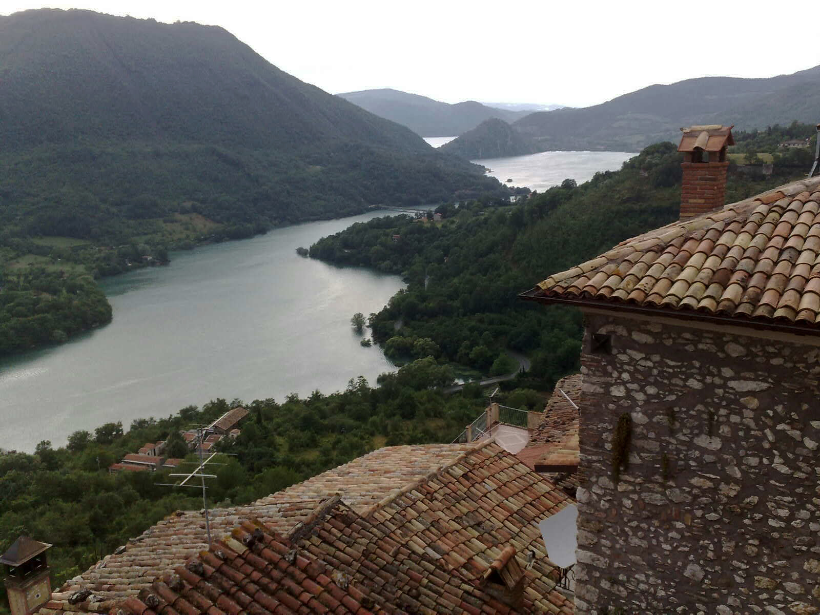 Il lago del Turano fotografato da Paganico Sabino (provincia di Rieti, Lazio)